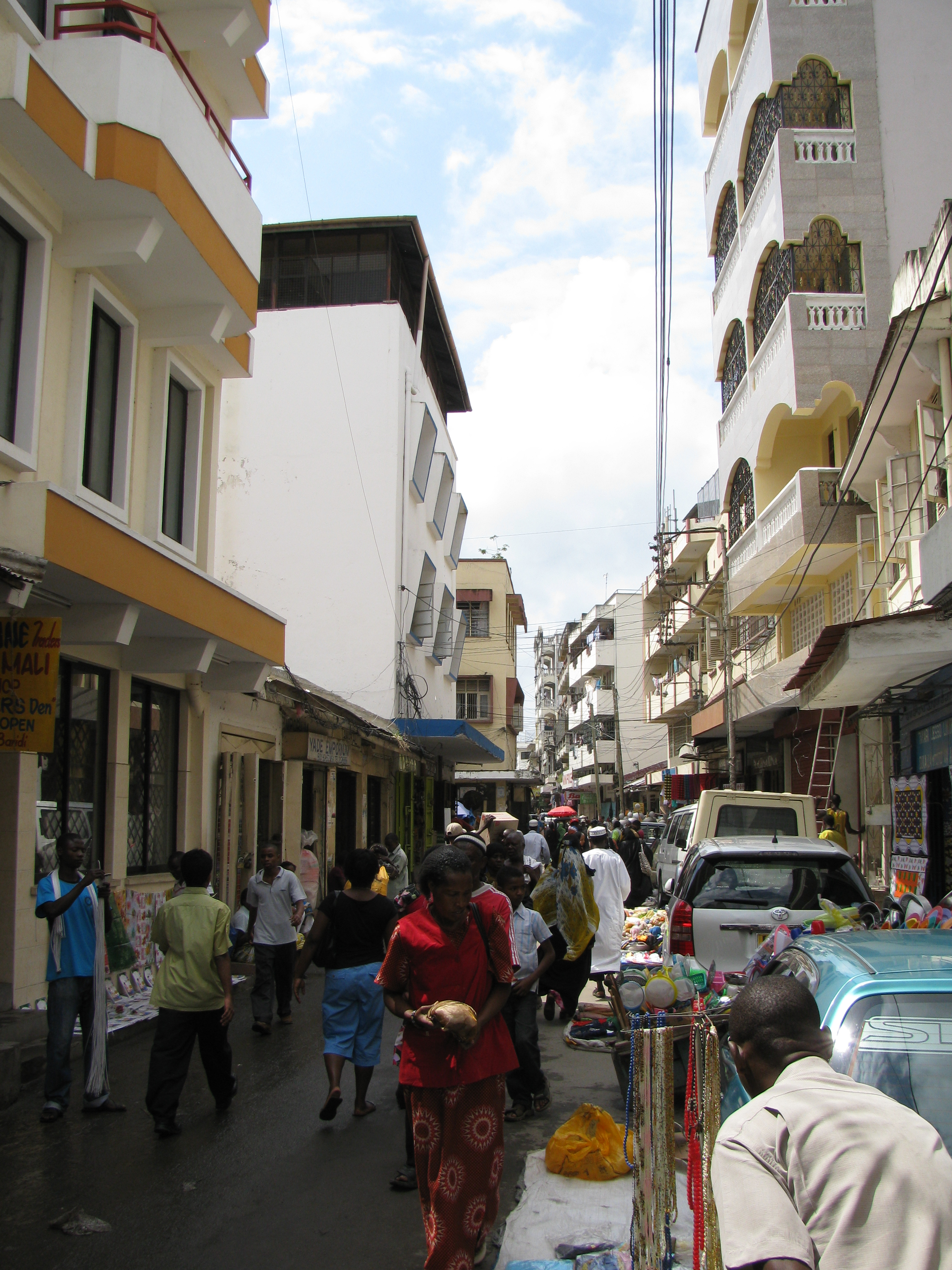 Mombasa biashara street